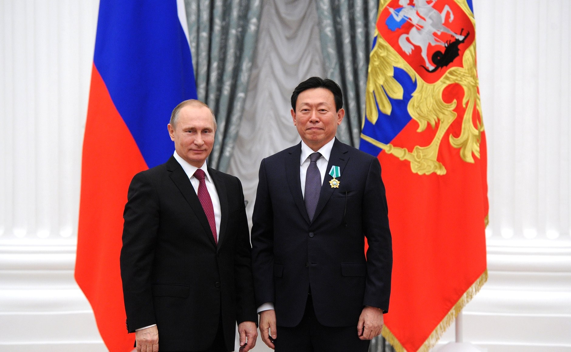 На церемонии вручения государственных наград Российской Федерации. Орденом Дружбы награждён председатель правления Группы компаний Lotte Син Дон Бин